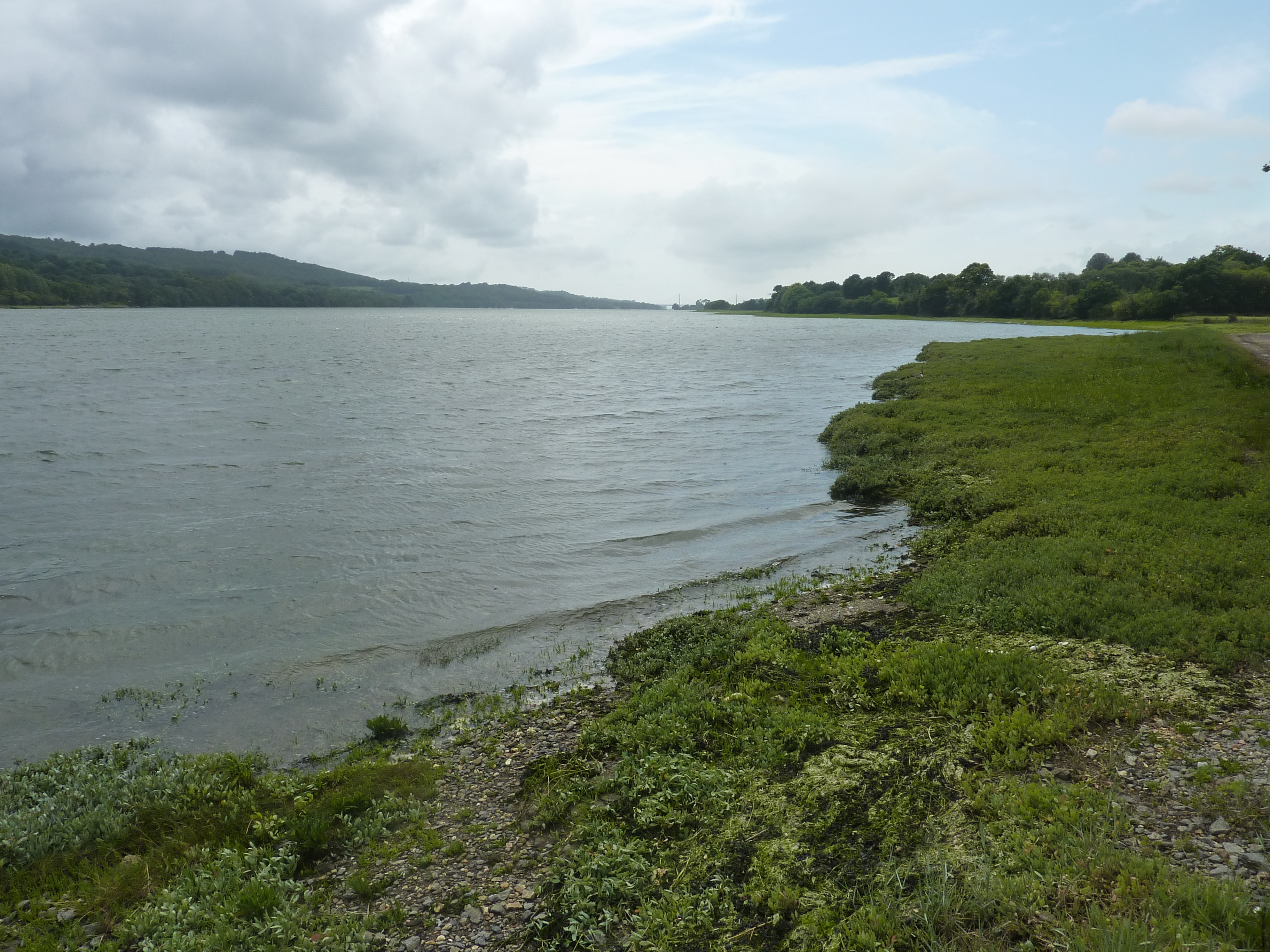 La Forest-Landerneau : l'anse du château en bordure de l'Elorn (vue vers l'aval ; au fond le pont de l'Iroise est à peine visible)